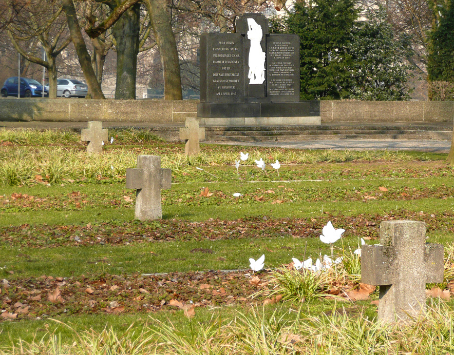 Russischer Friedhof am Maschsee in Hannover